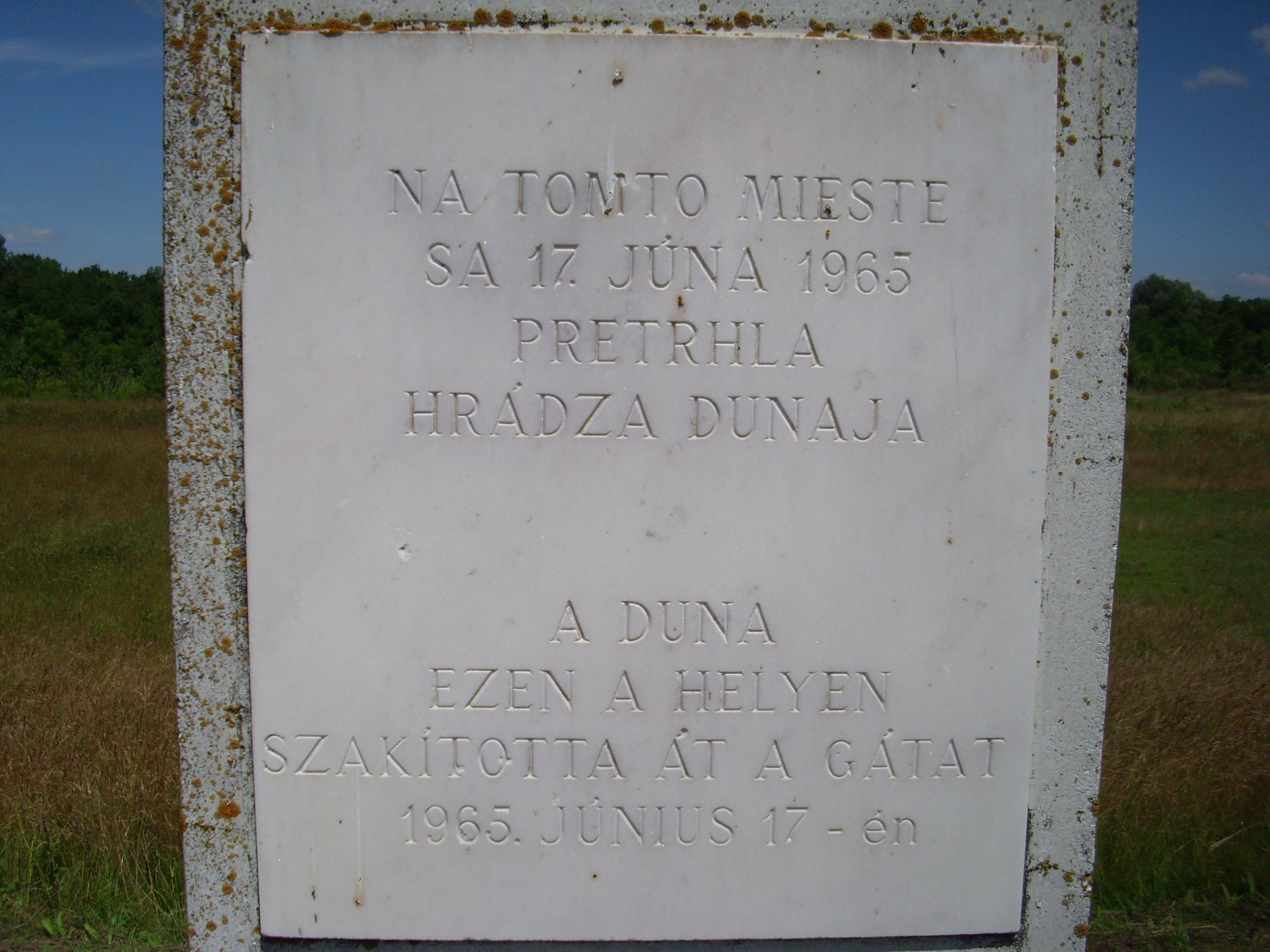 Kulcsod melletti 1965. június 17.-i szakítás emlékművének felirata. Az emlékmű pontosan a szakítás helyszínén áll.